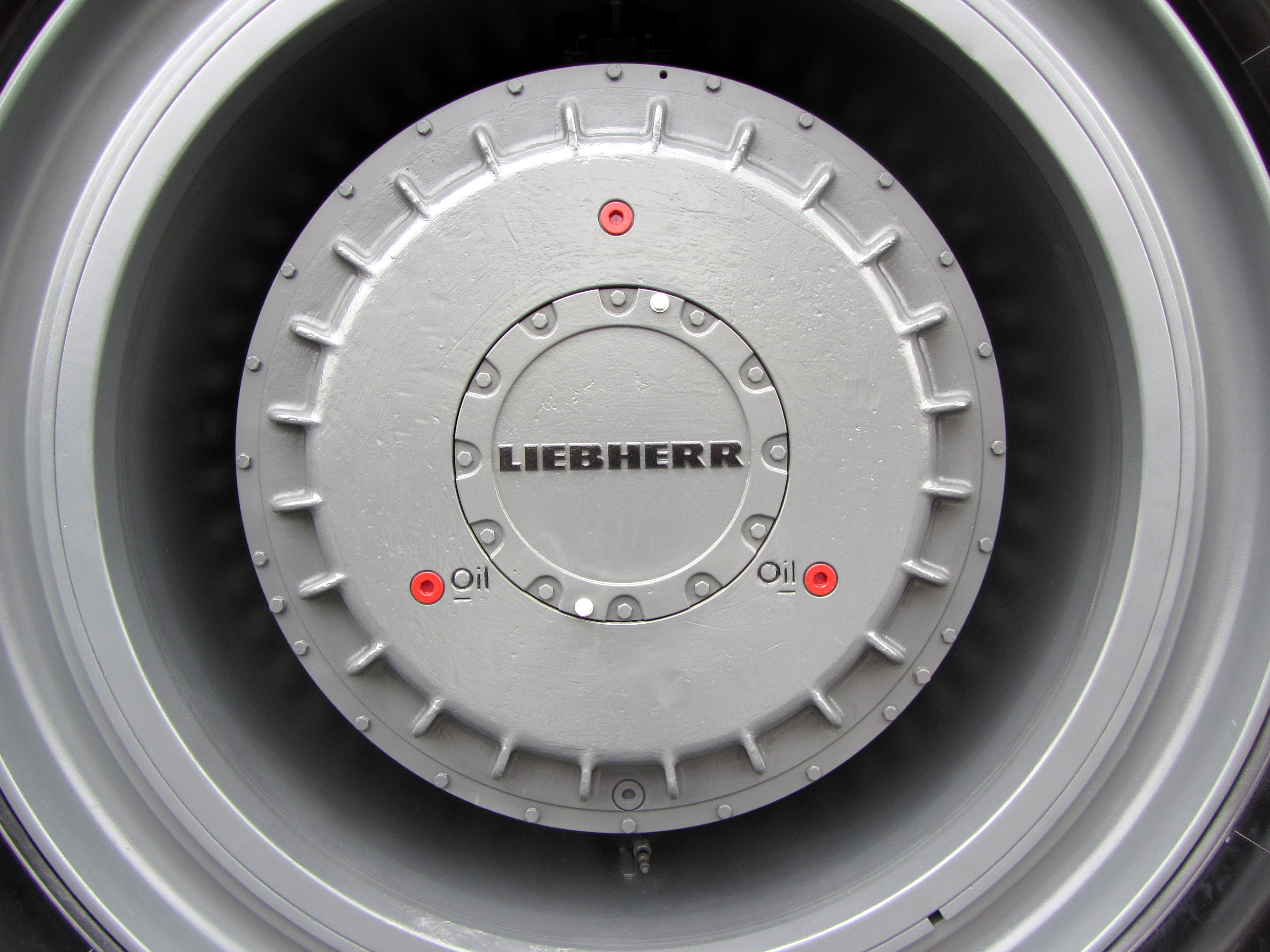 Liebherr T264